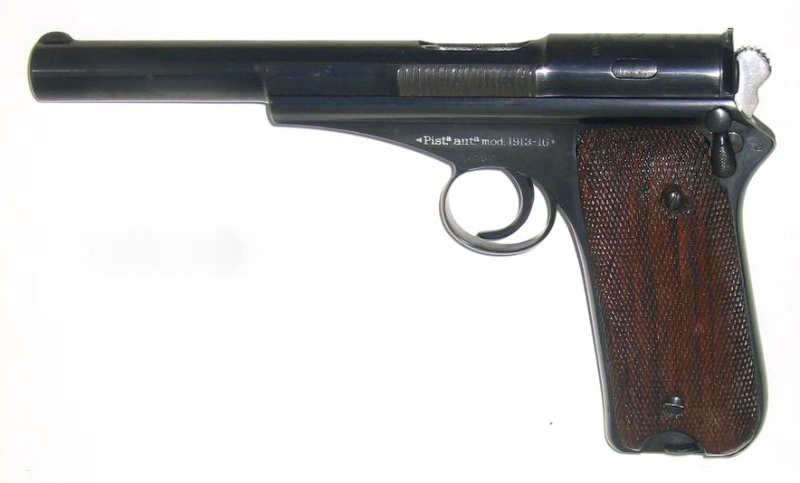 source/ Auteur gnafron